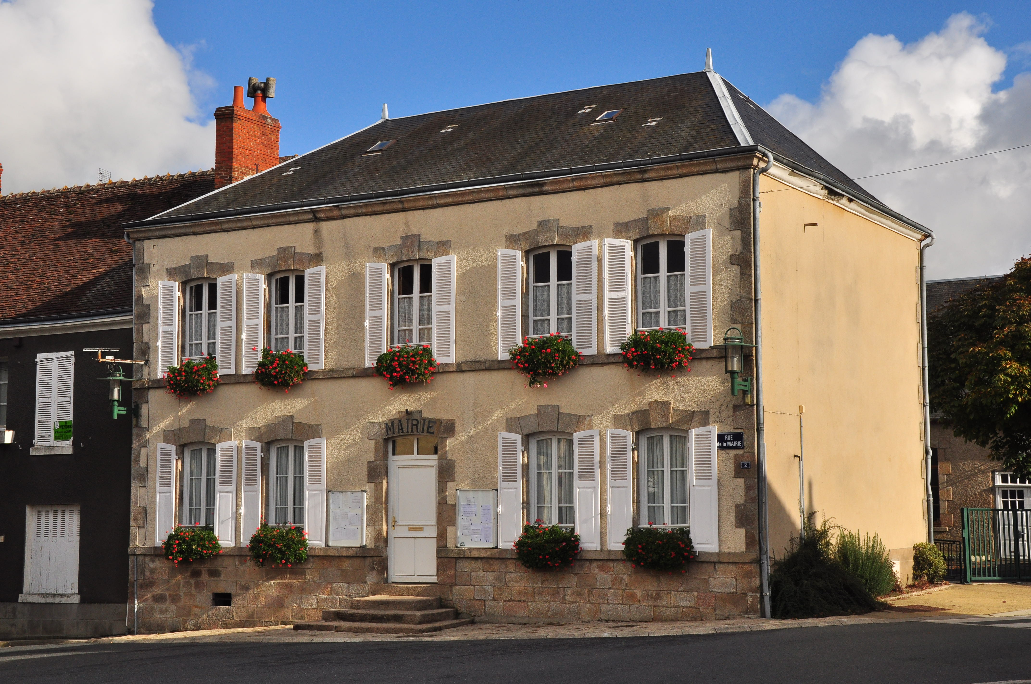 Marie d'Orsennes (Indre)